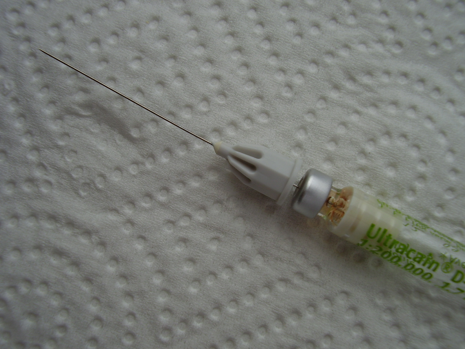 Karpulenspritze